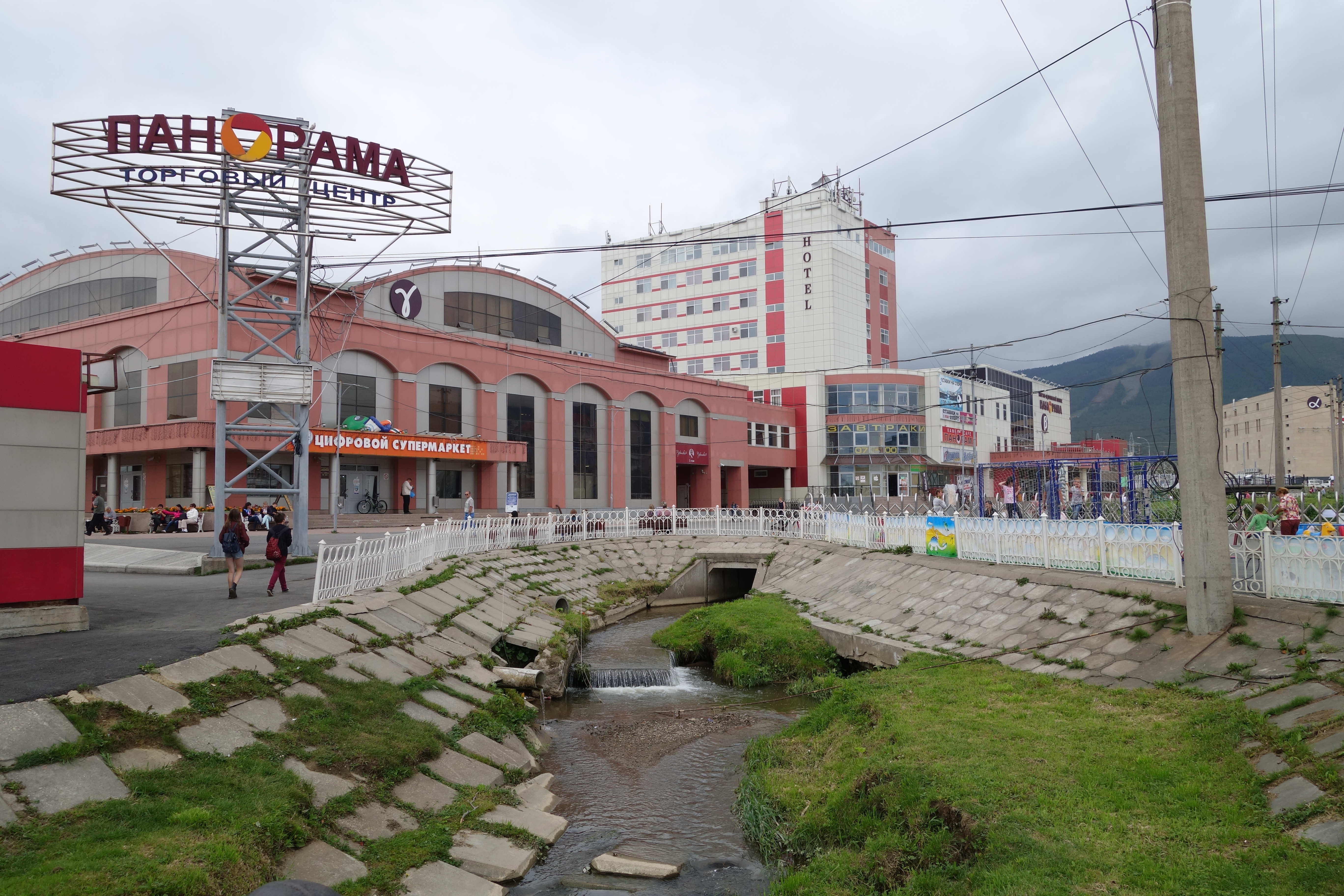 Торгово-гостиничный комплекс "Панорама". Южно-Сахалинск. 2014 г.